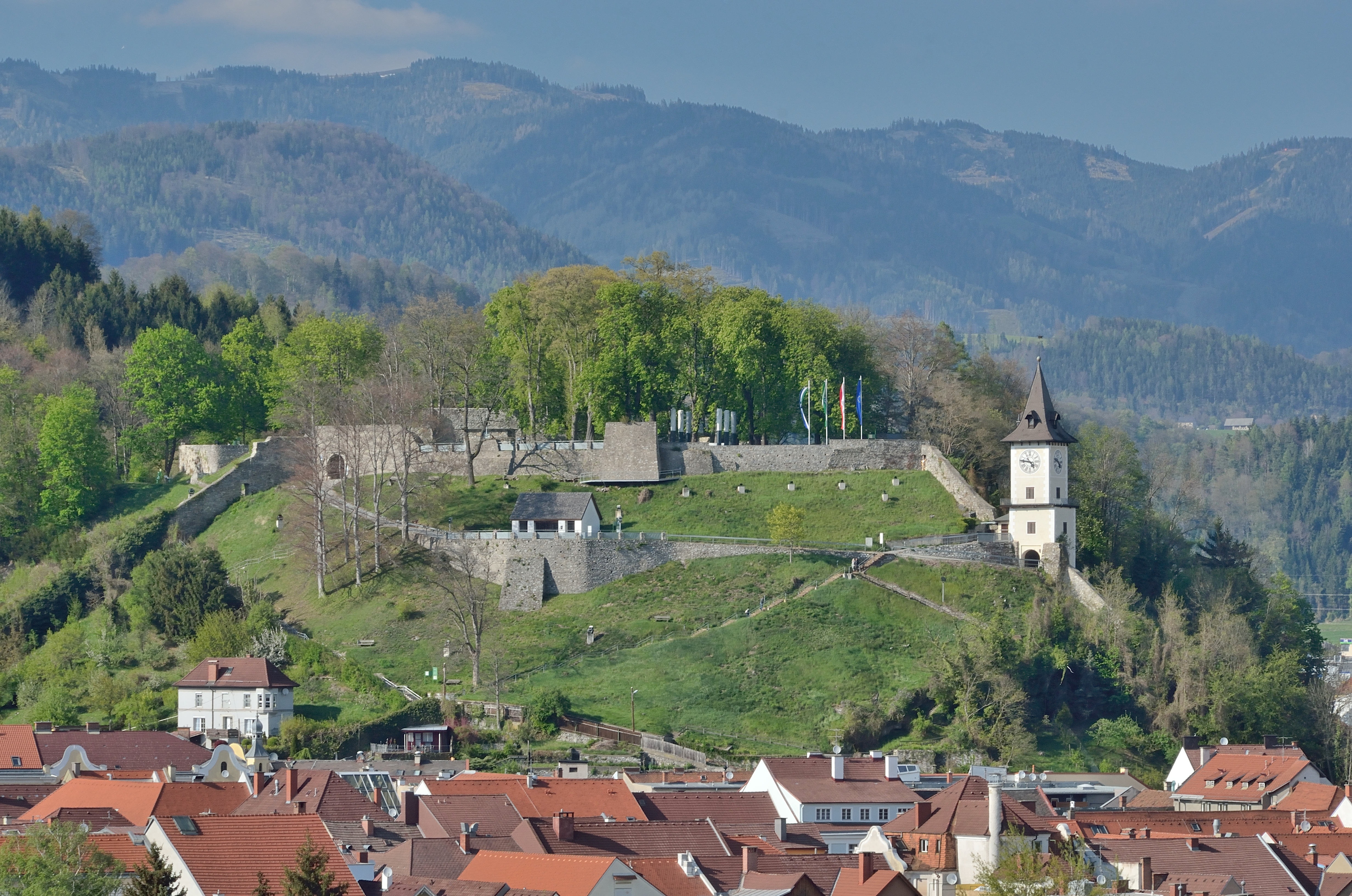 Die Burgruine Landskron, Bruck an der Mur, mit dem zum Uhrturm umgestalteten Torturm von vis-à-vis (Burkhardtweg).